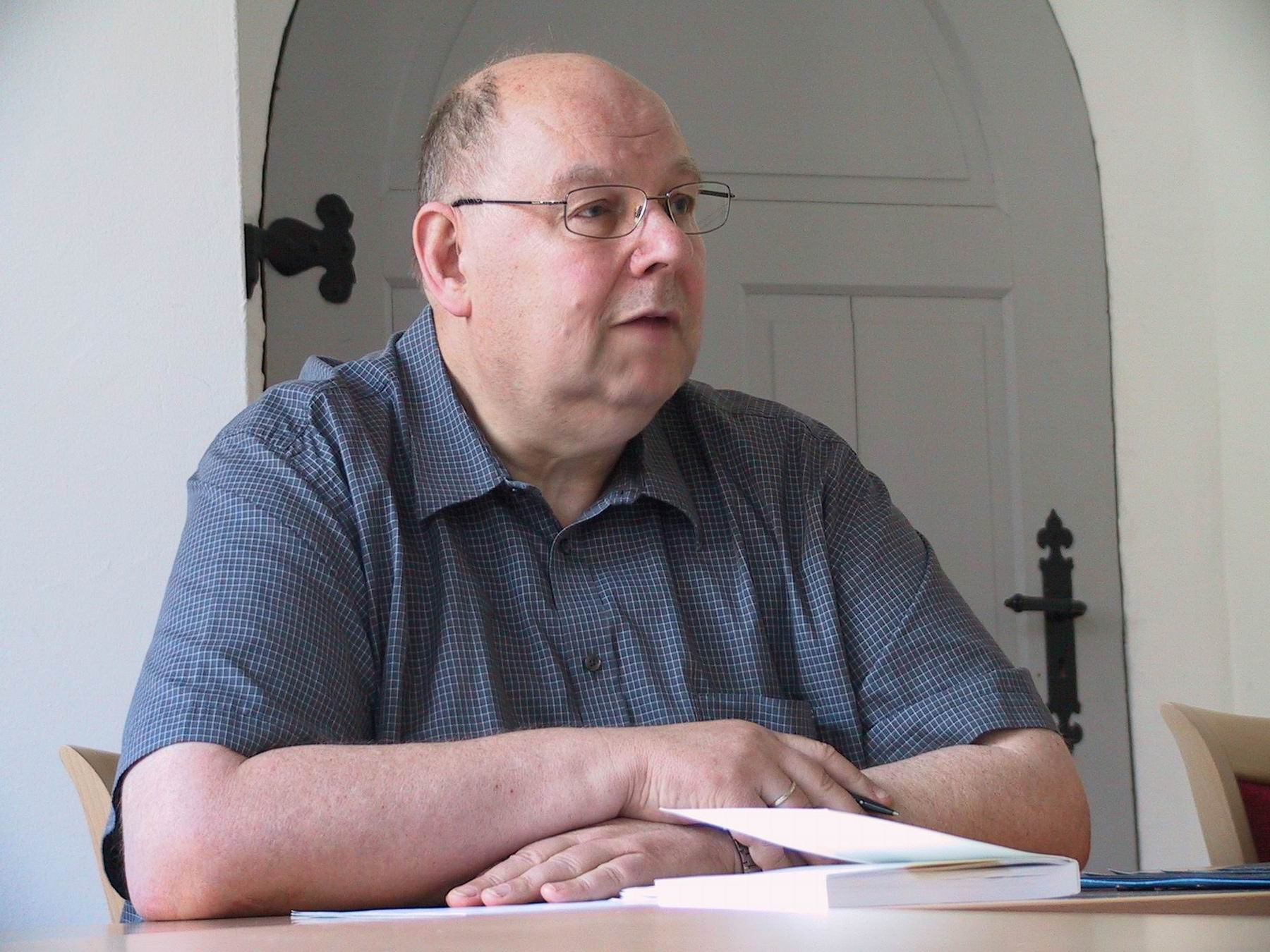 Der sächsische SPD-Landespolitiker Karl Nolle